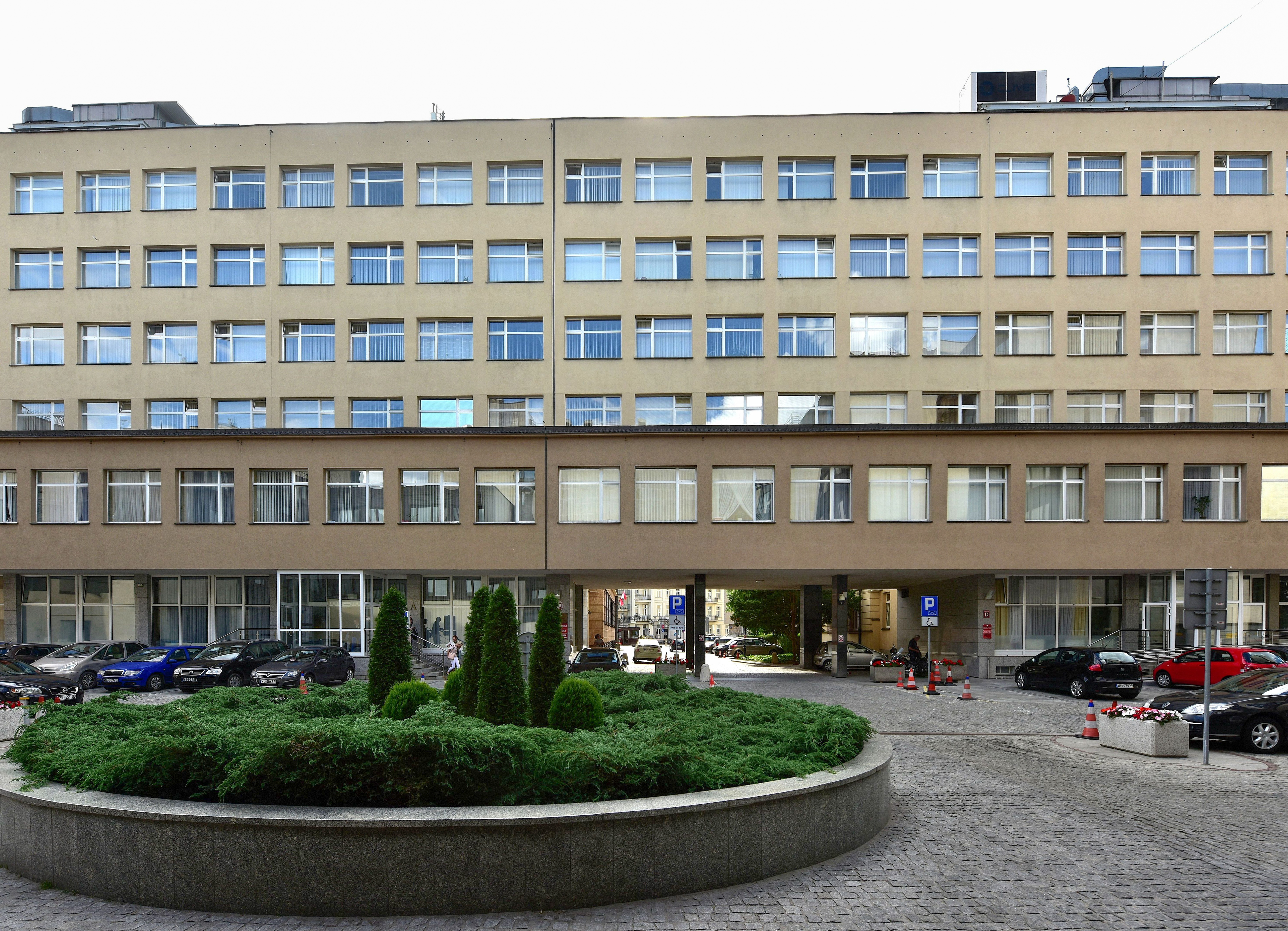 Siedziba Państwowej Komisji Wyborczej i Krajowego Biura Wyborczego przy ul. Wiejskiej 10 w Warszawie, widok od strony Nowego Domu Poselskiego